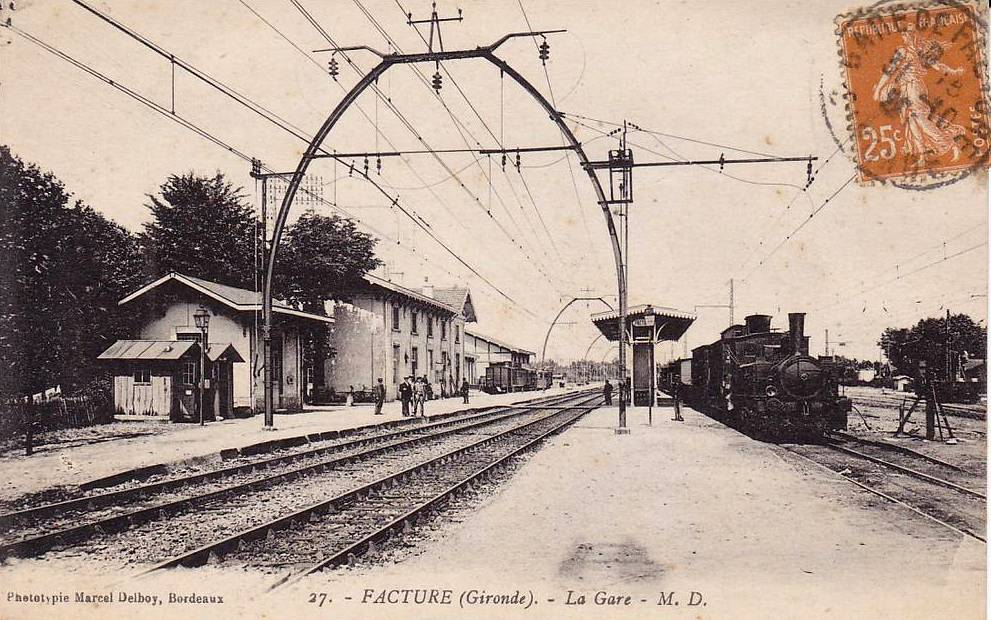 Facture on post-cards